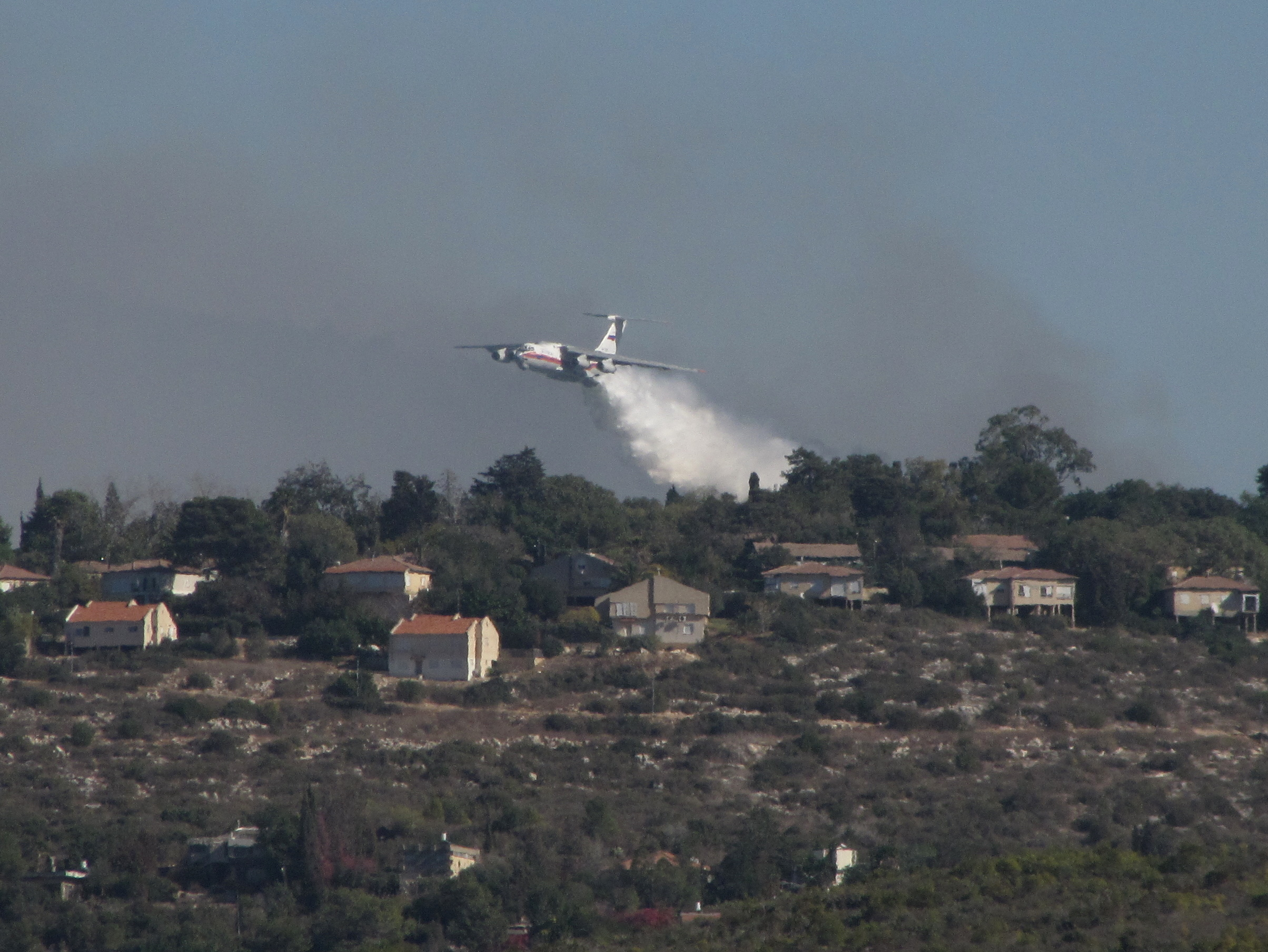 מטוס אליושין 76 רוסי בעת פעולות כיבוי השריפה בכרמל, סמוך לניר עציון.